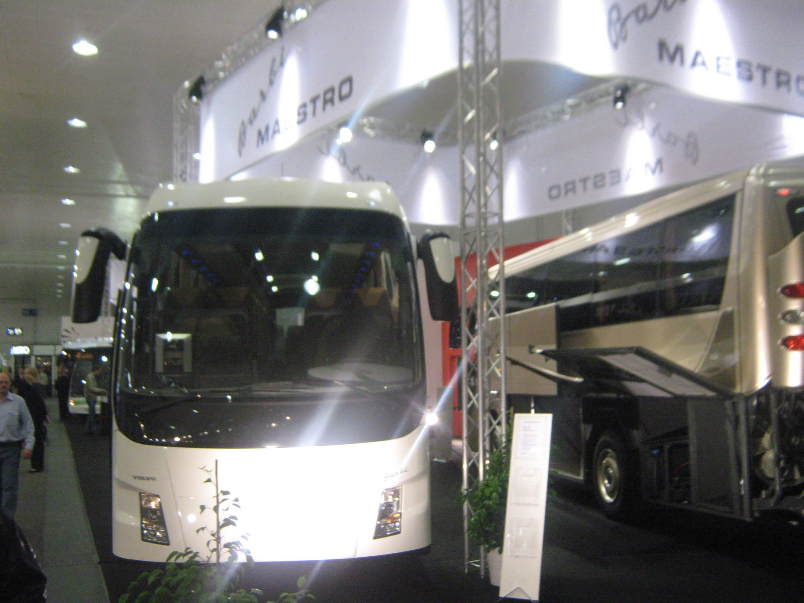 Internationale Automobilausstellung für Nutzfahrzeuge in Hannover 2010